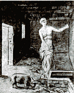 Desenho da Vênus de Milo realizado por um artista anônimo em 1820, logo após sua redescoberta